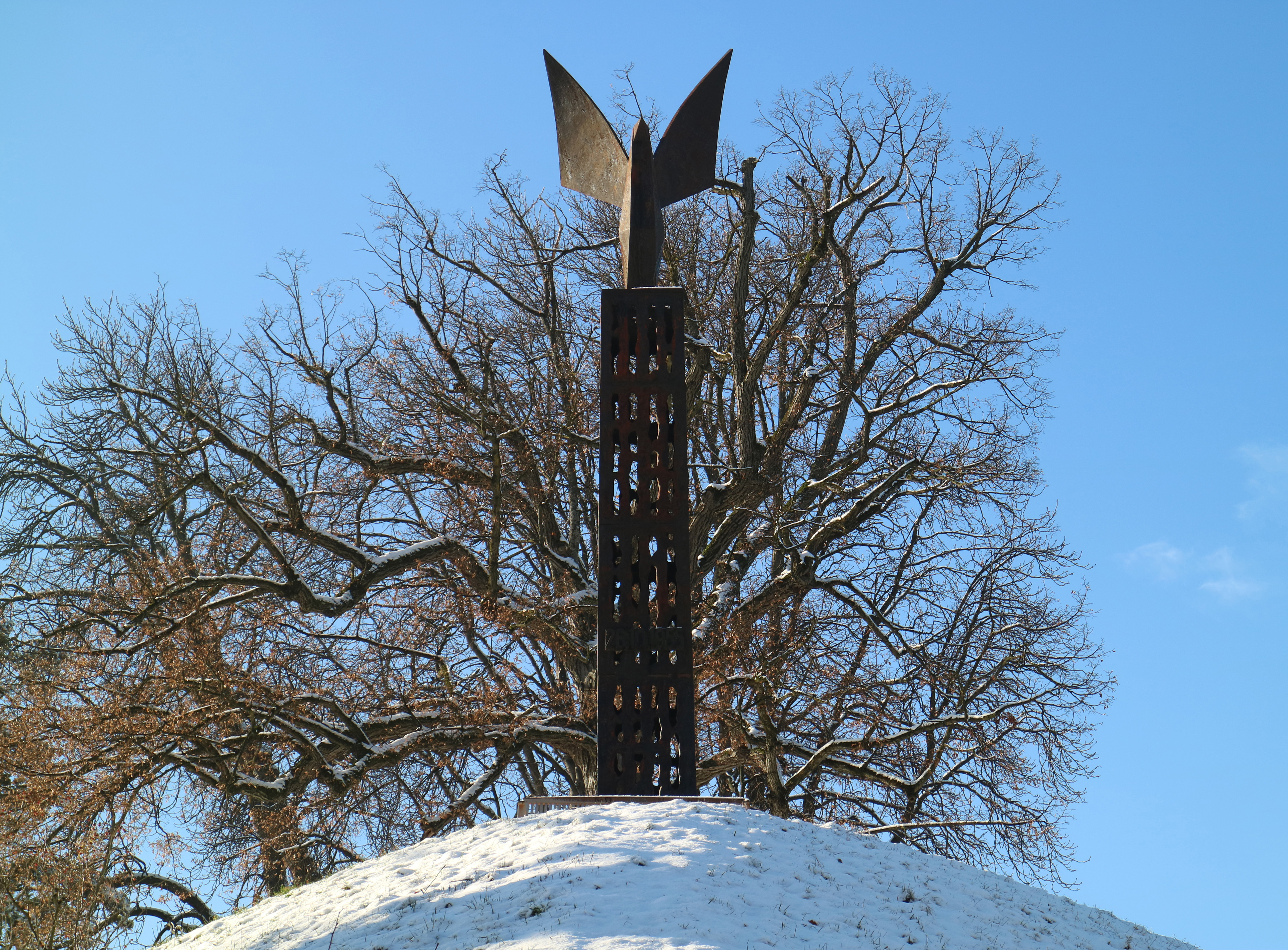 Befreiungsdenkmal von Wolfgang Skala (1960) im Grazer Burggarten